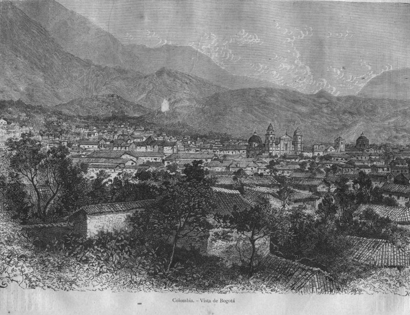 Vista de Bogotá